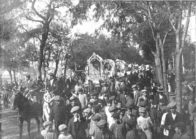 Procesión en honor a la Virgen del Rocío en el barrio sevillano de Triana, en 1912. Marcado con una "x" se puede apreciar al torero Juan Belmonte montado a caballo.